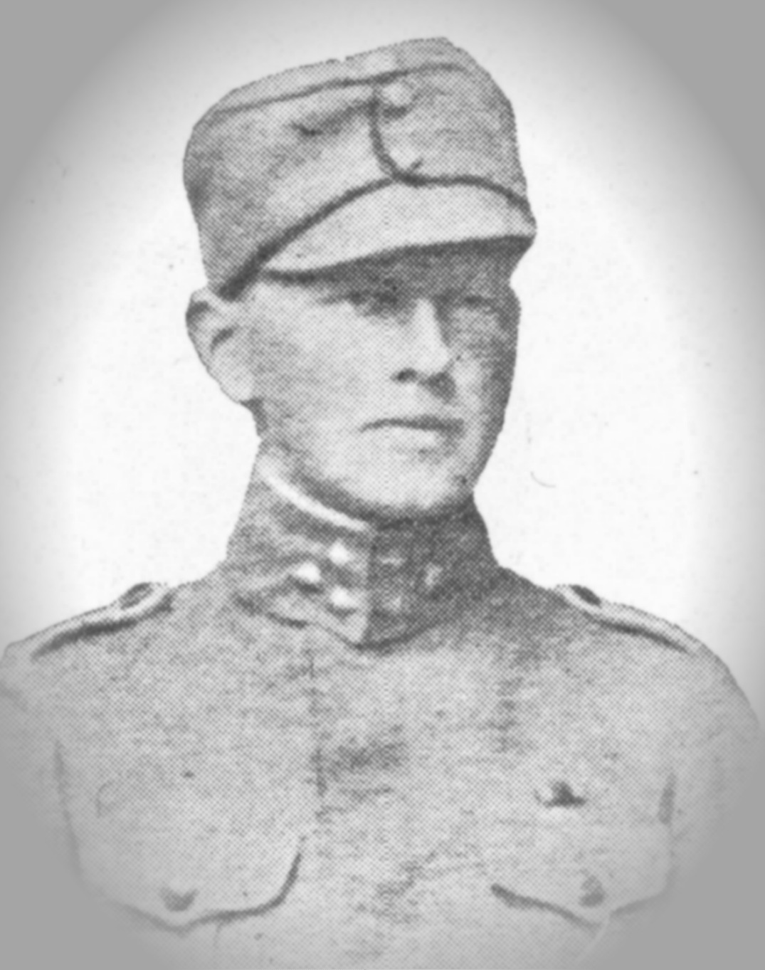 Description